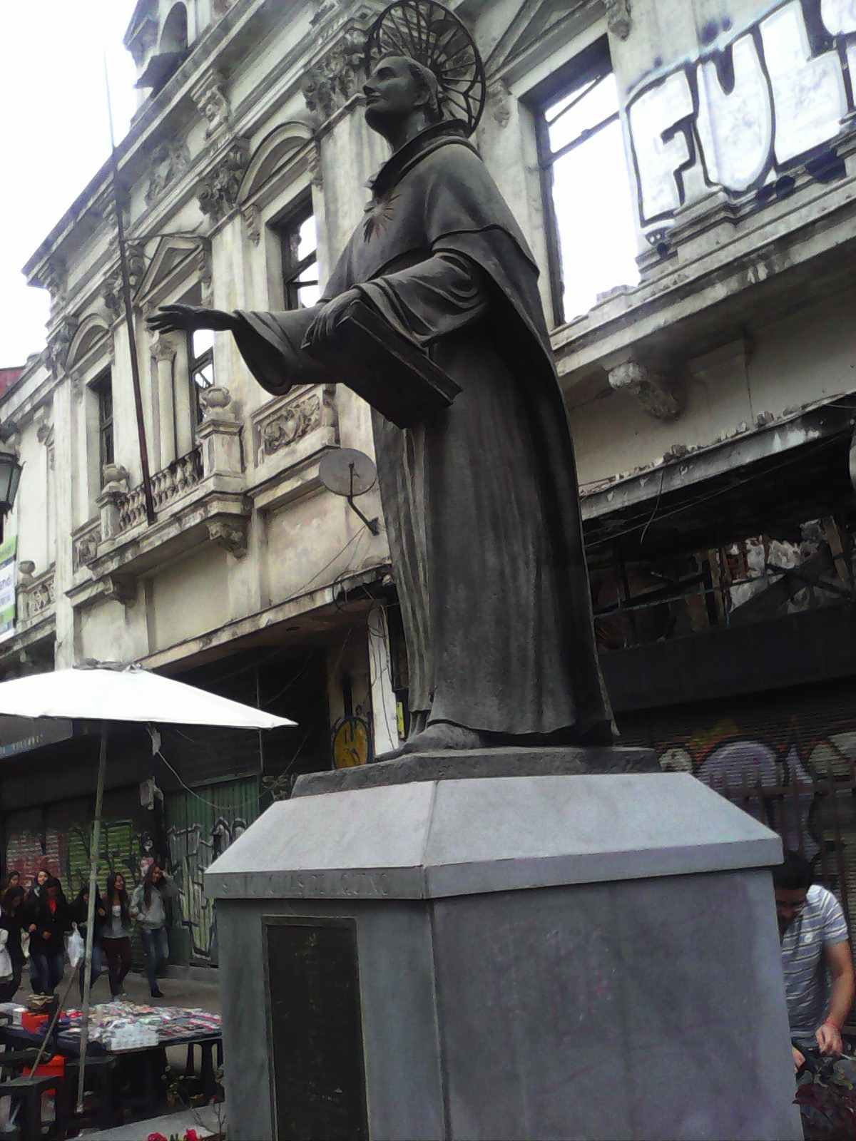 estatua de Santo Tomás de Aquino, obra del escultor chileno Daniel Cordero Barrera, ubicada en la esquina de calle Ejército y Avda. Libertador Bdo. O´higgins en la ciudad de Santiago de Chile.